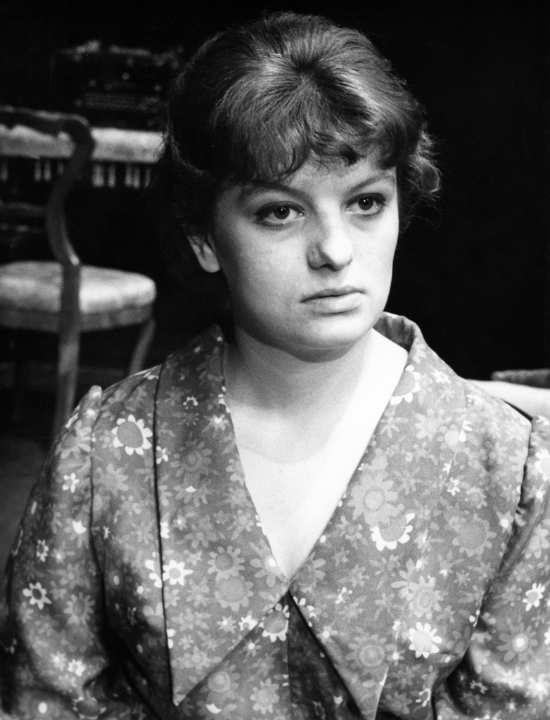 Tennessee Williams, Stekleni zverinjak, UL AGRFT. Na fotografiji: Ljerka Belak (Amanda).